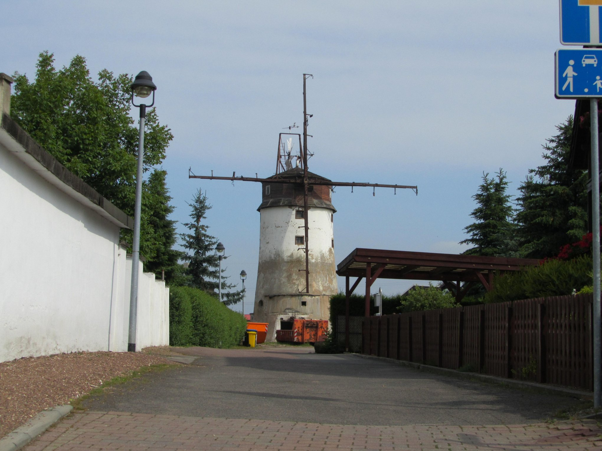 Lettin (Halle), Windmühle, Kameraposition: N51 31.489 E11 54.114